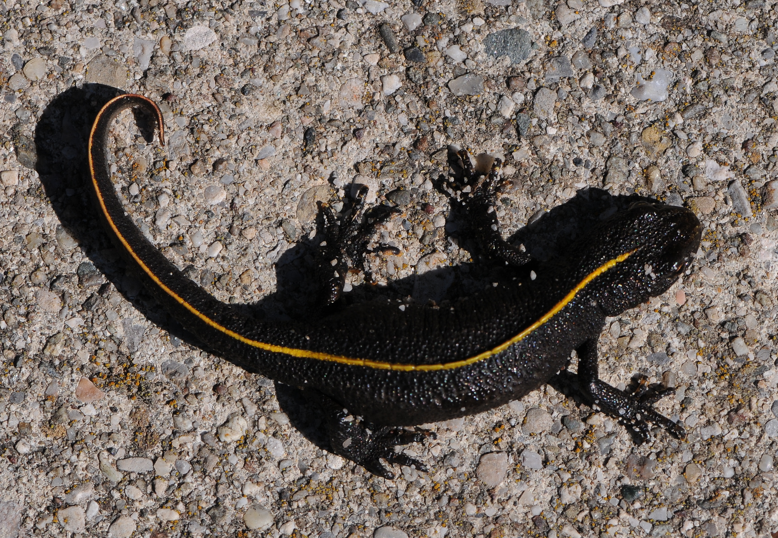 Triturus carnifex